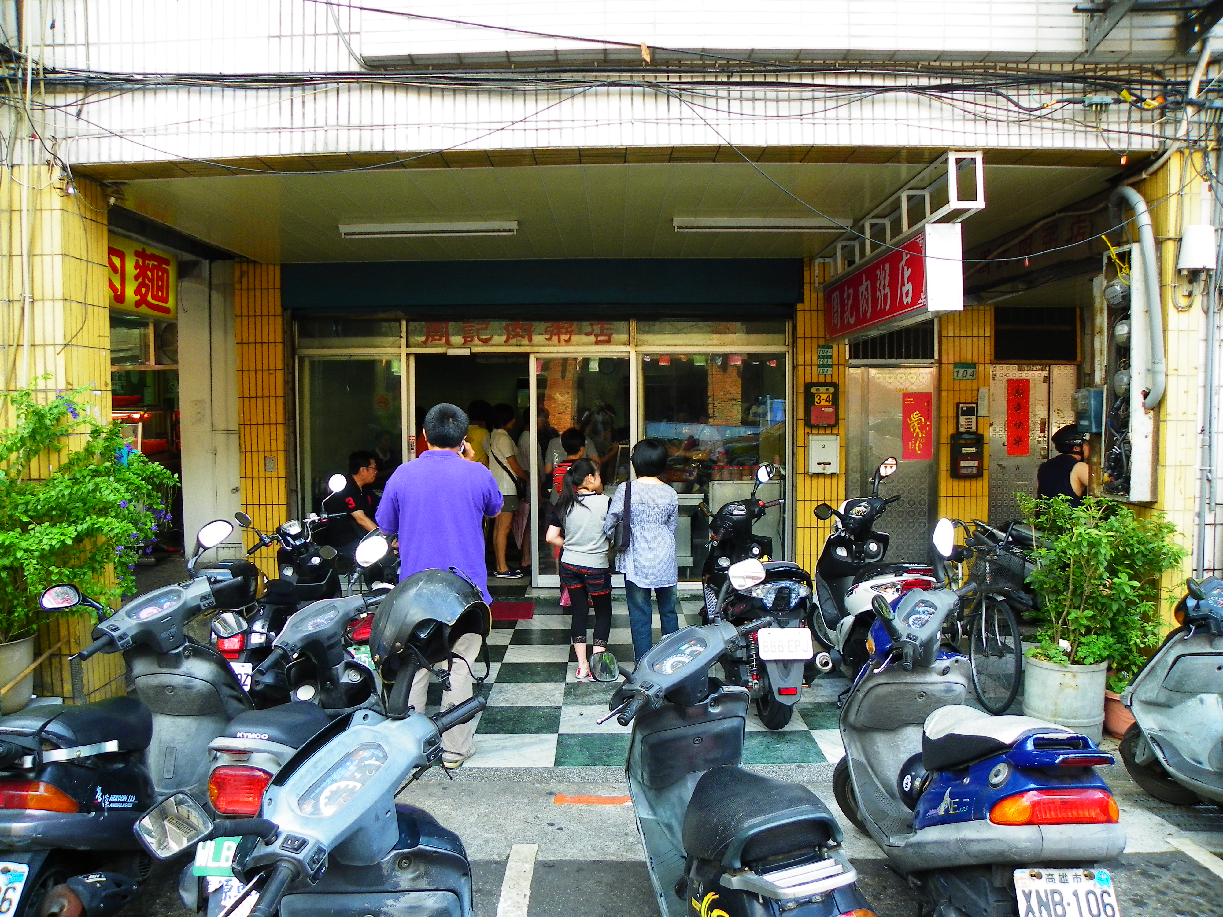 周記肉粥店，地址：臺北市萬華區廣州街104號。